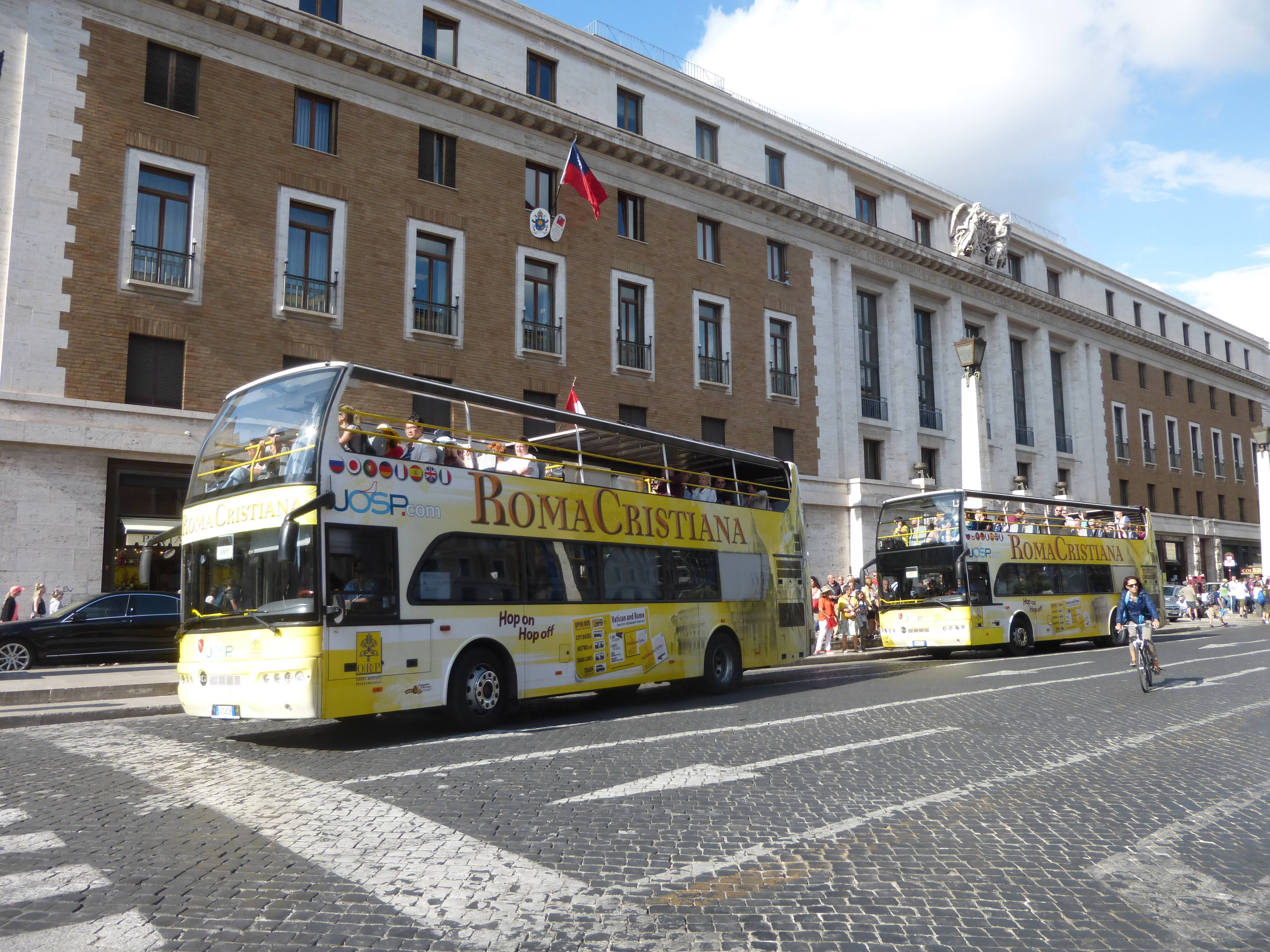 Roma, via della Conciliazione. Pellegrinaggi turistici.